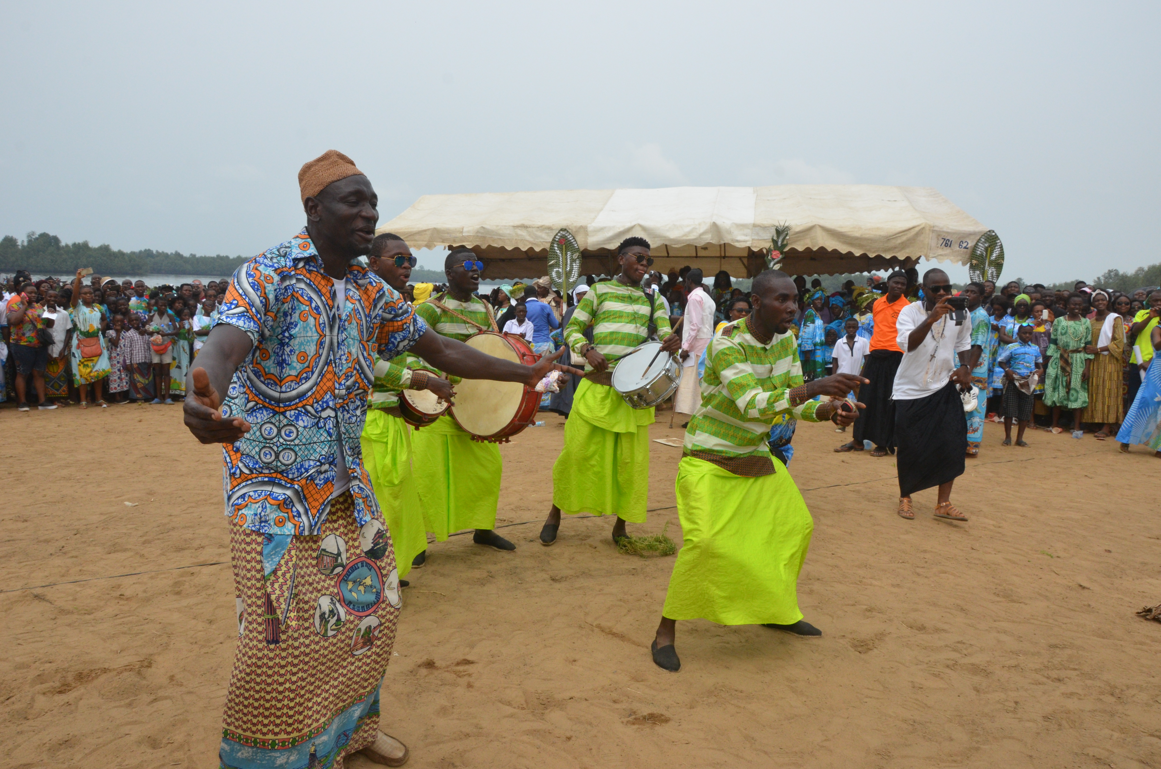 Groupe de danse sawa lors du Ngondo 2016 près des berges du Wouri This is an image from Cameroon